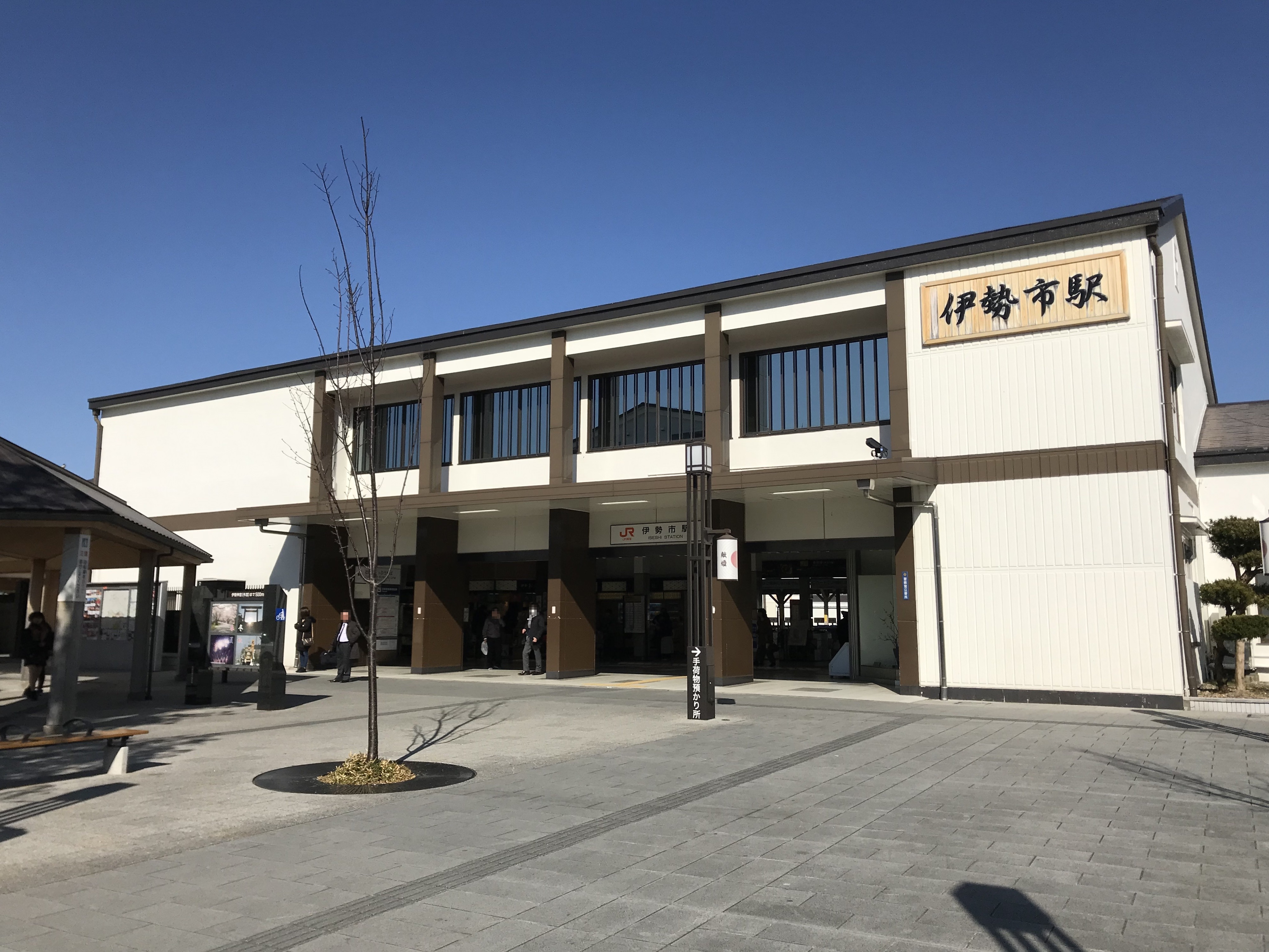 伊勢市駅の駅舎